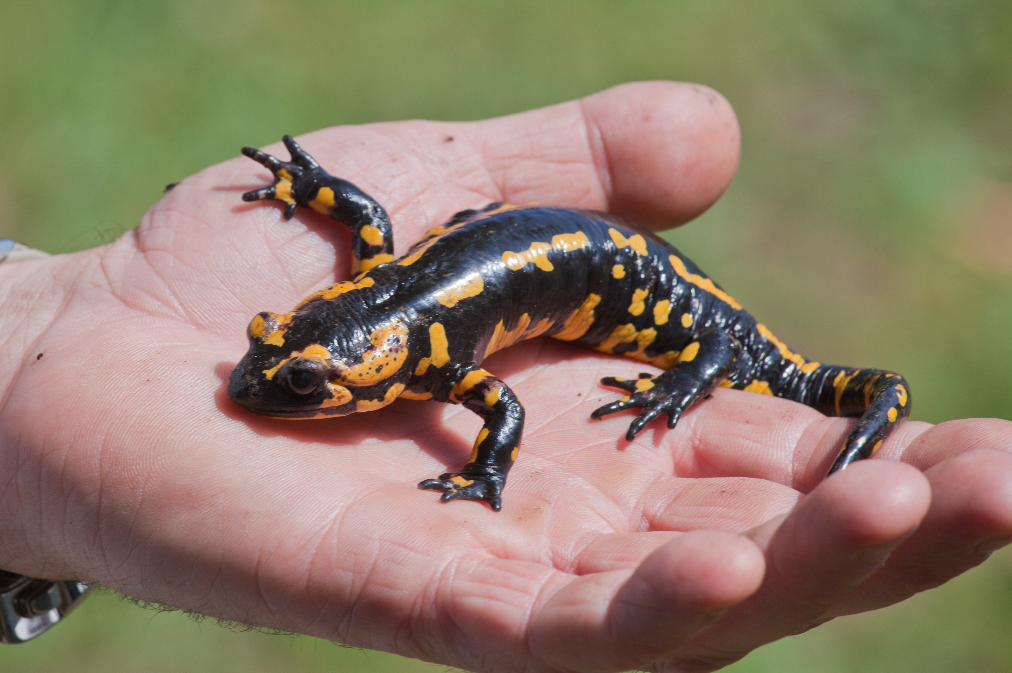 Píntega_en_Boiro, Galicia (Spain)